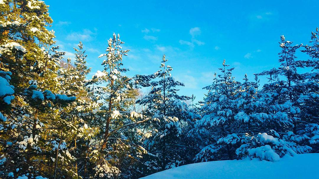 Snötäckta tallar i Trolldalen, Nacka